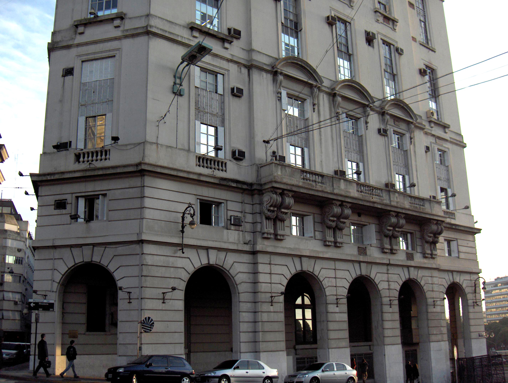 Lugar donde antiguamente se encontraba el Hotel Argentino, donde José Hernández terminó de escribir el Martín Fierro. Av. Leandro N. Alem 10 (cerca de la Plaza de Mayo), barrio San Nicolás, Buenos Aires. Actualmente es sede del servicio de inteligencia del estado (SIDE) donde se realizan informes para el Ejecutivo nacional.